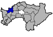 KaurJmeb為編輯臺灣省嘉義縣六腳鄉，於2005年2月10日所繪。